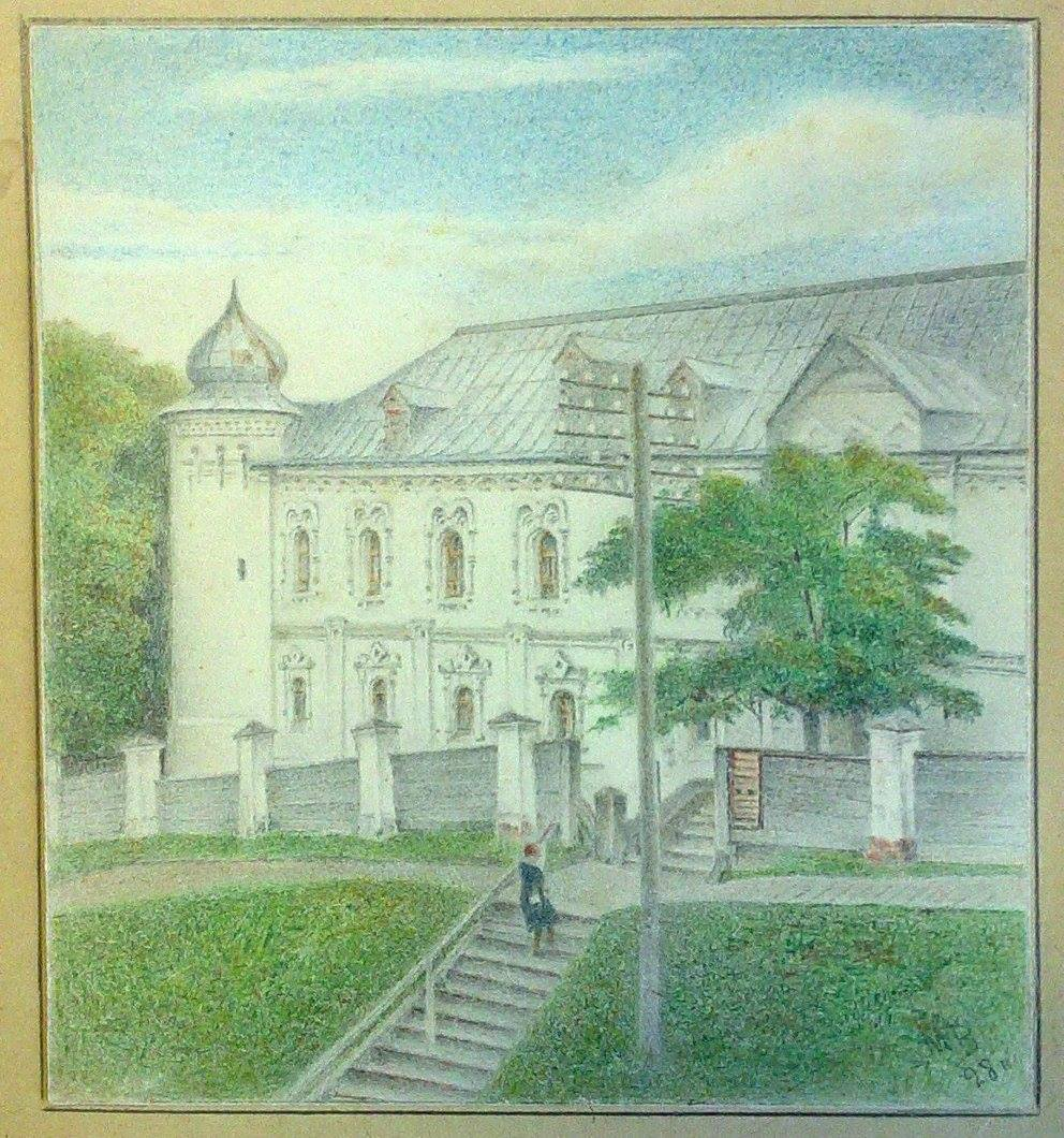 Беларуская (тарашкевіца): Менск (Miensk), Новае Места (Novaje Miesta). Архірэйскае падвор’е (Archirejskaje padvorje)